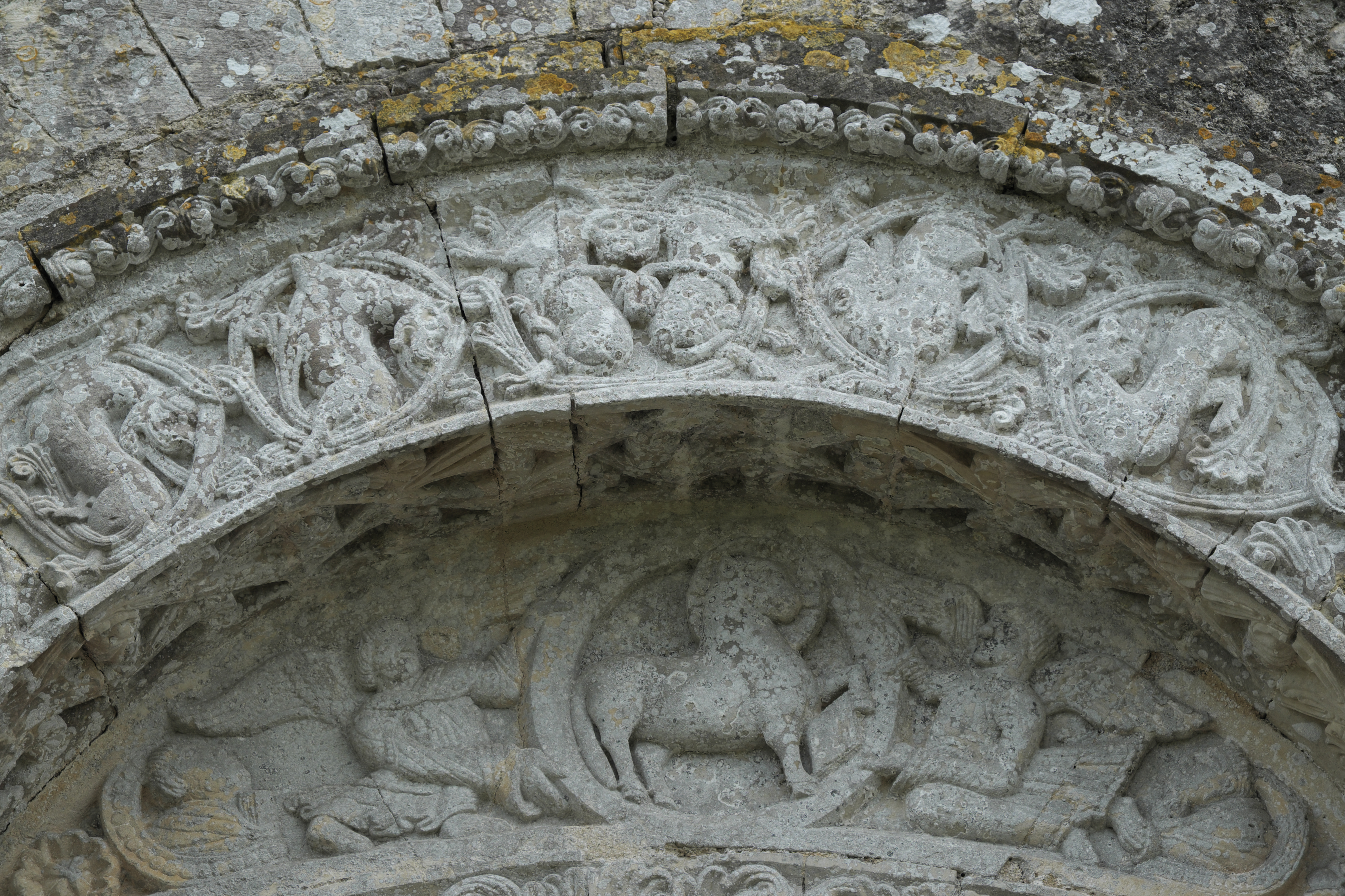 Katholische Kirche Saint-Denis in Lichères im Département Charente (Nouvelle-Aquitaine/Frankreich), Portal, Archivolten und Tympanon mit dem Relief eines Lammes